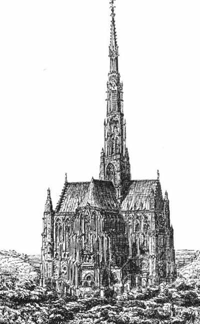 Cathédrale de Beauvais avec sa flèche, avant 1573.